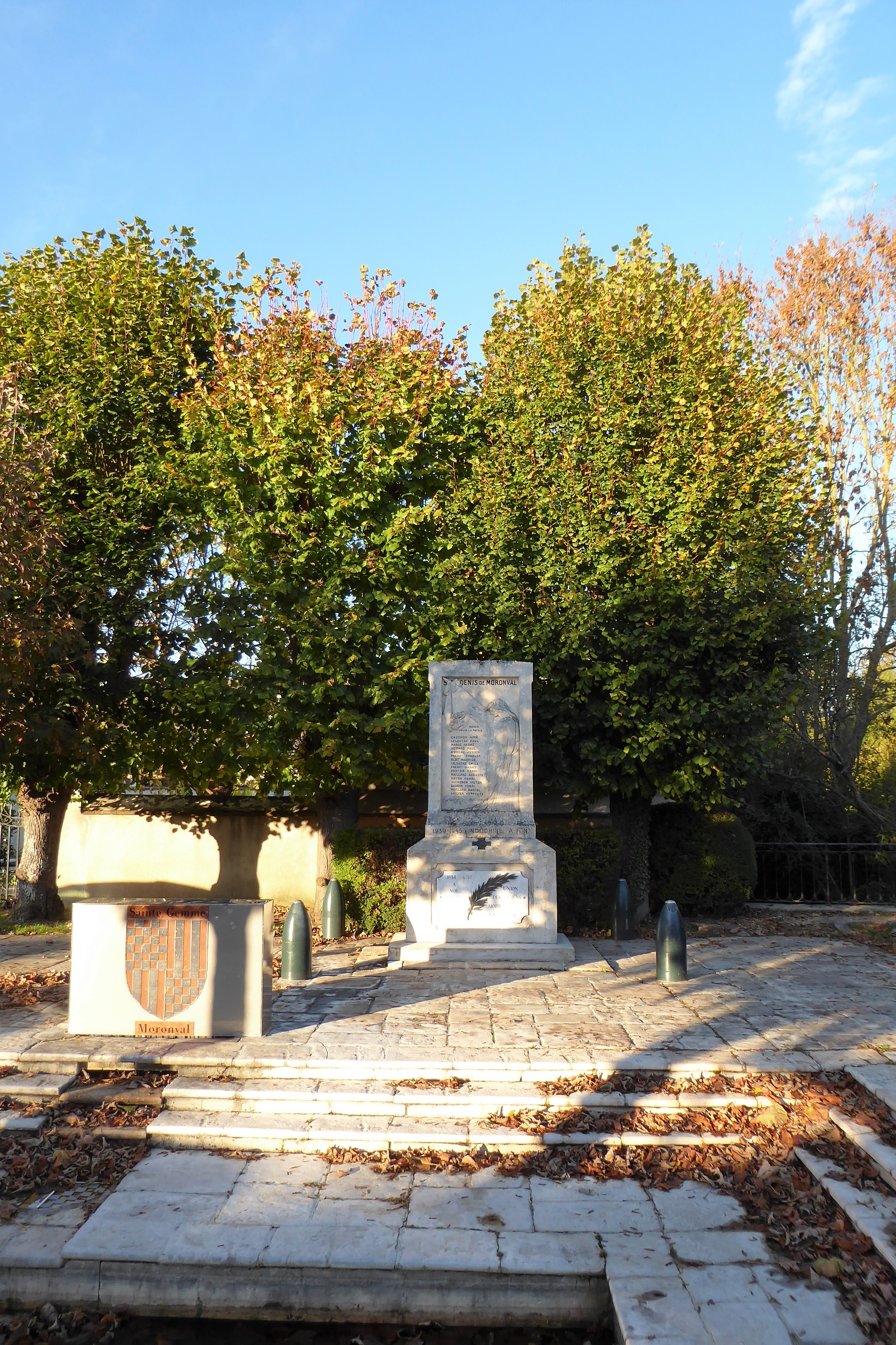 monument aux morts, Sainte-Gemme-Moronval, Eure-et-Loir, France.